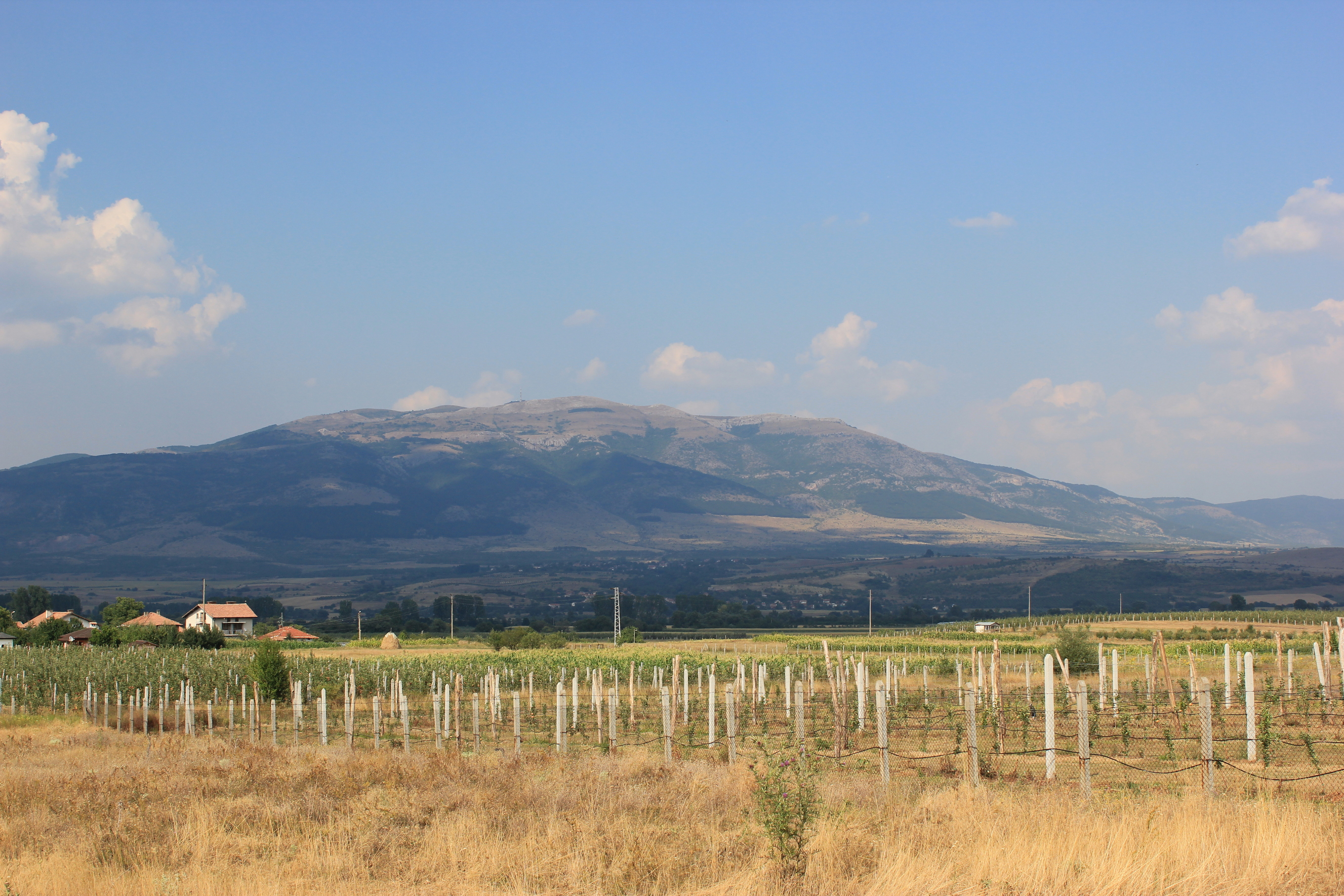 Hornjoserbsce: Krajina blisko Kjustendila w Bołharskej.